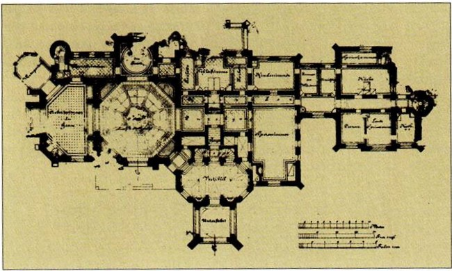 Arhitekta Otto Piusa Hipiusa zīmētais Sangastes pils pirmā stāva plāns. 1878. Igaunijas vēstures arhīvs.